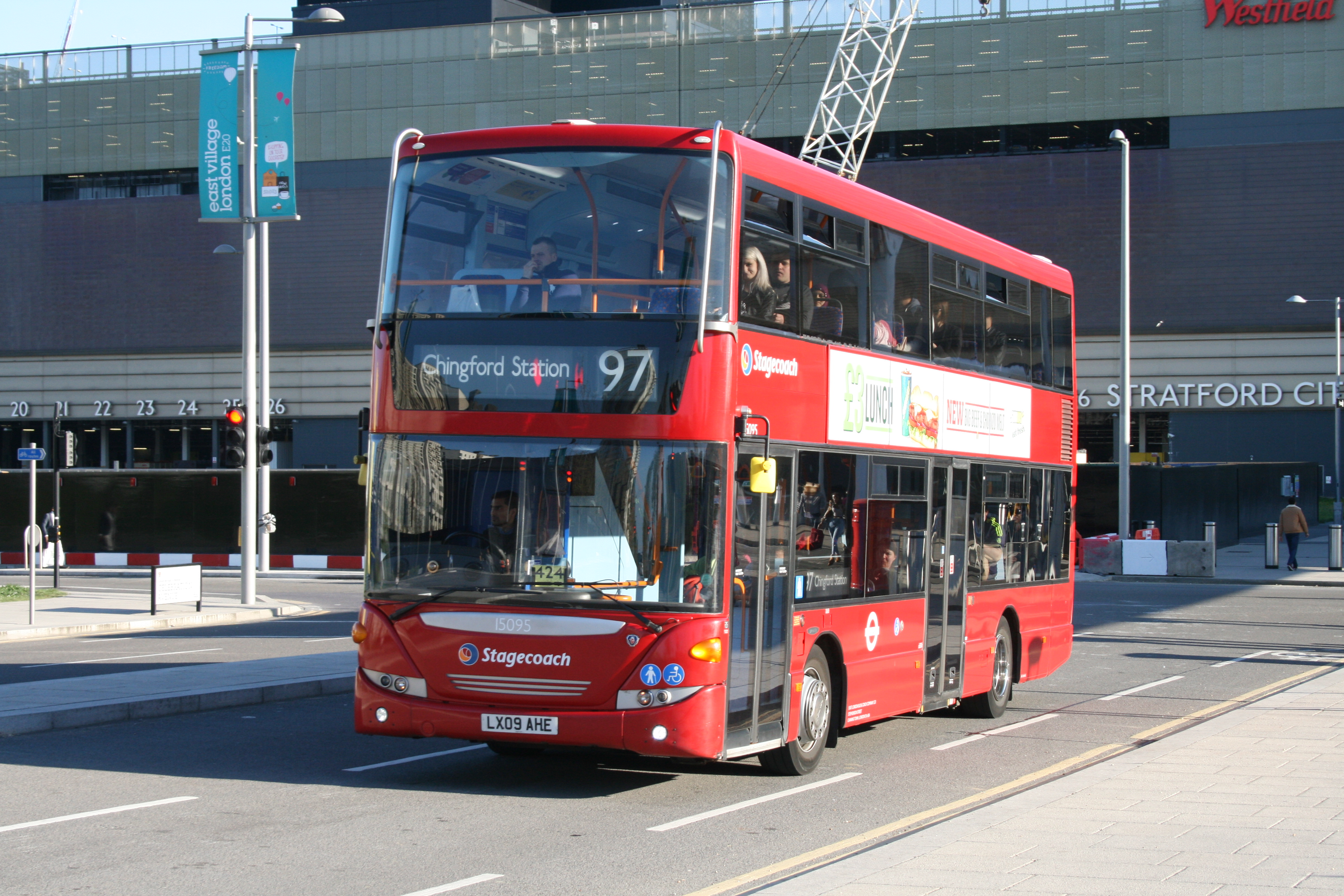 LX09 AHE